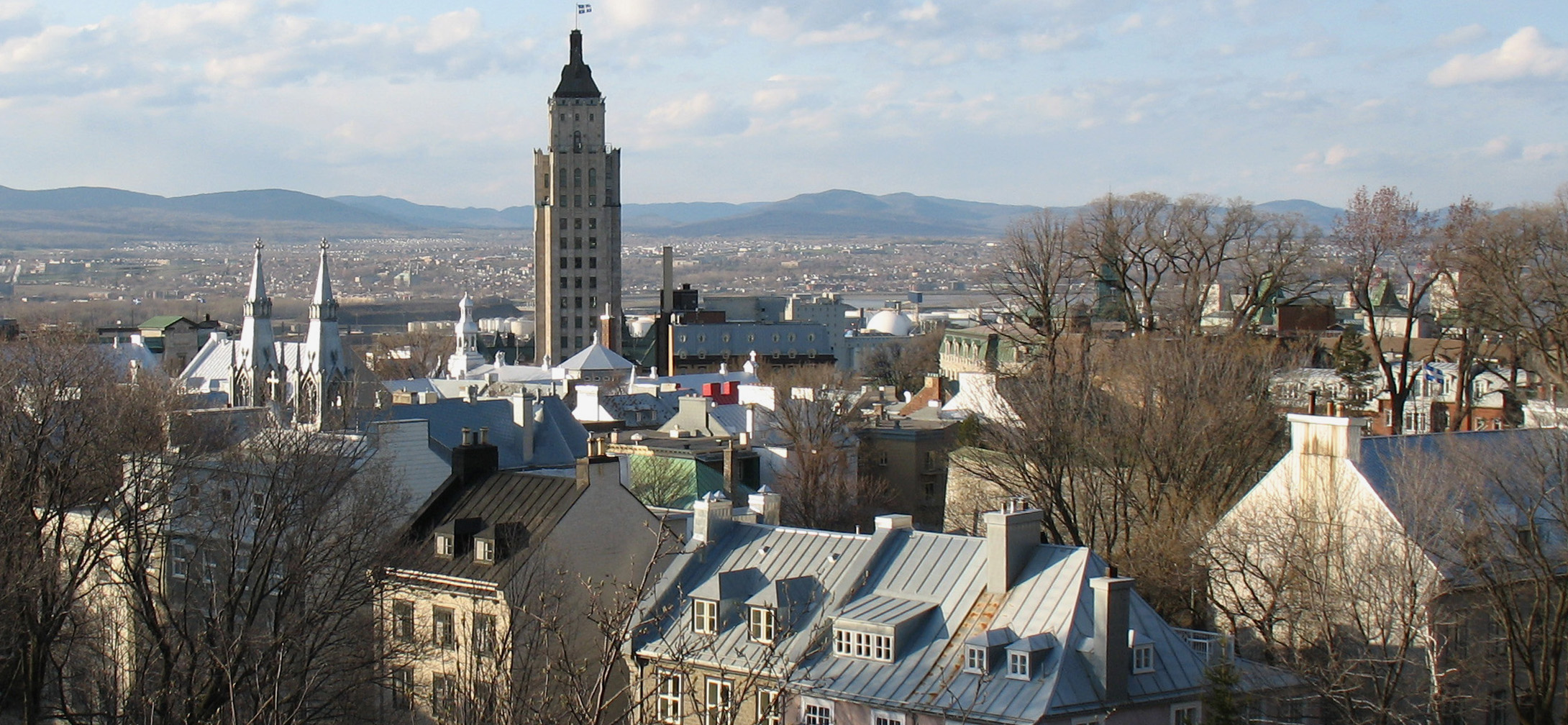 Arrondissement historique du Vieux-Québec vu de la Citadelle, Québec, Canada. L'arrondissement figure depuis 1985 sur la liste du patrimoine mondial établie par l’UNESCO.